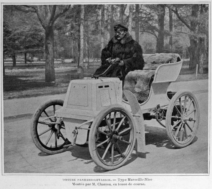 Fernand Charron, vainqueur de Marseille-Hyères-Nice en mars 1898, sur Panhard type Marseille-Nice.